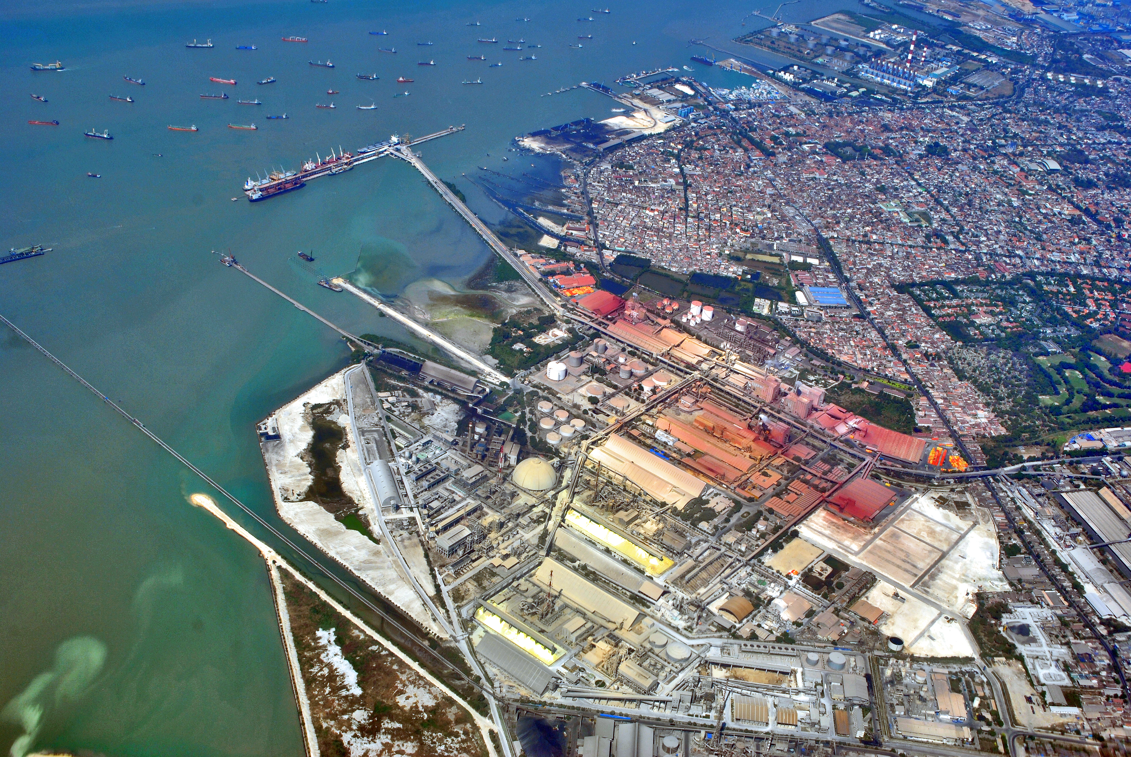 Petrokimia Gresik